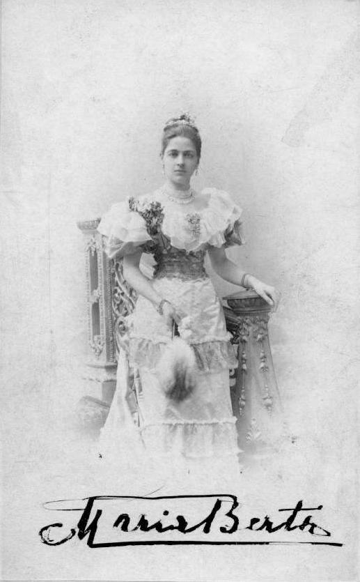 María Berta, esposa de don Carlos, de pie y elegantemente vestida, sobre una escalera simulada, apoyando su mano izquierda en la barandilla de balaustres y sujetando una abanico de plumas con la mano derecha.